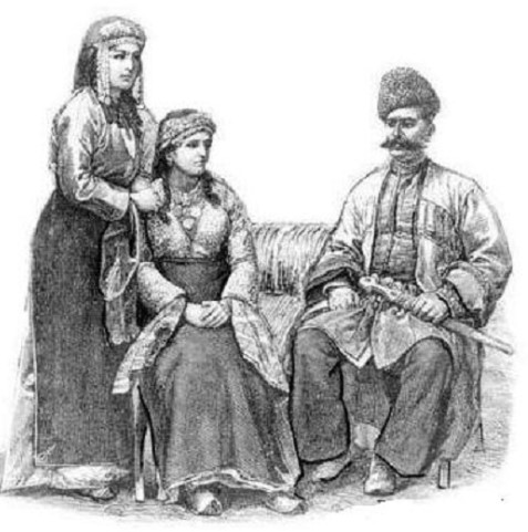 Крым, XVIII век. Крымские армяне.